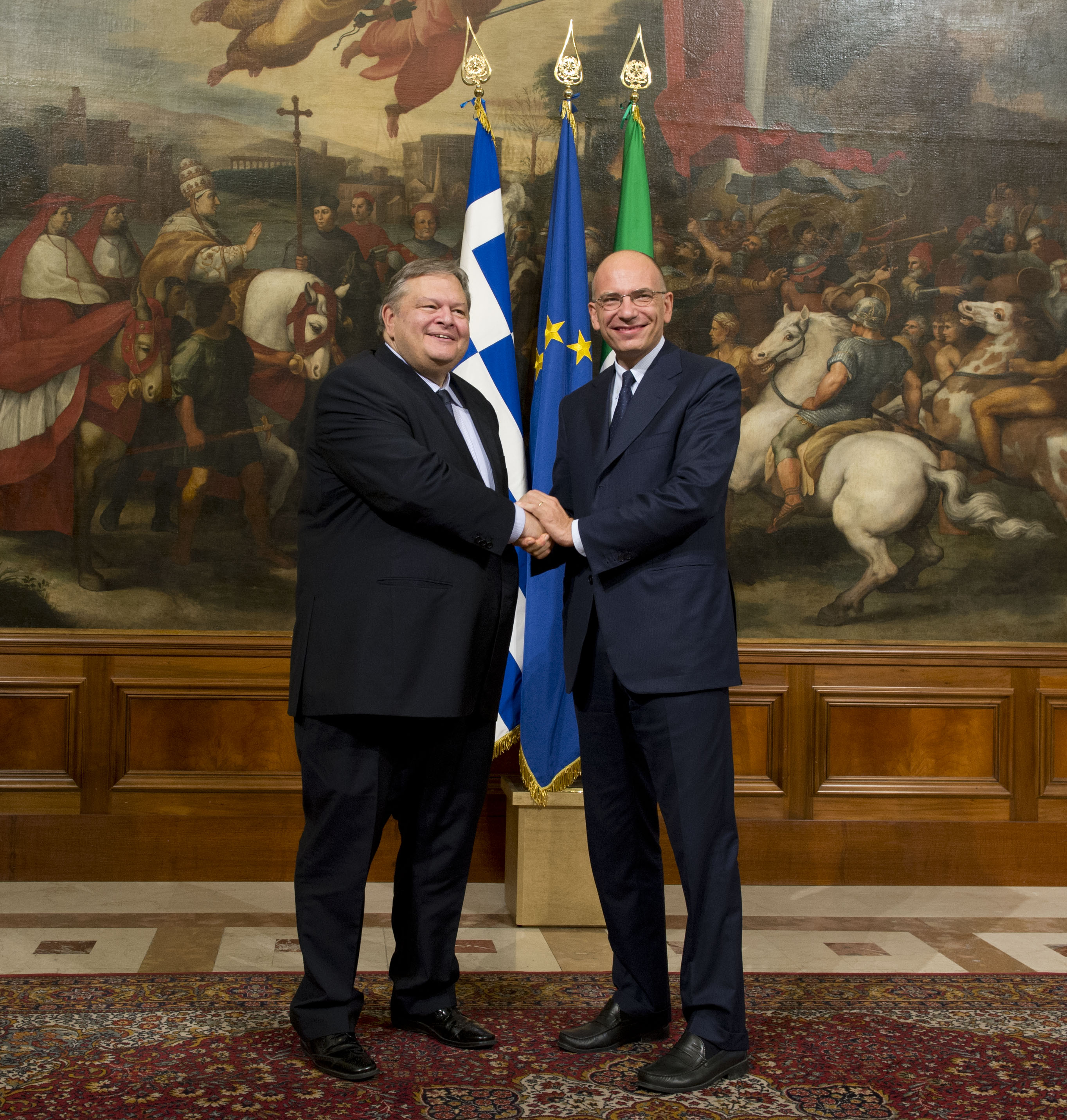 Ο Αντιπρόεδρος της Κυβέρνησης και Υπουργός Εξωτερικών Ευάγγελος Βενιζέλος πραγματοποίησε επίσκεψη στην Ιταλία στις 16 και 17 Σεπτεμβρίου, κατά τη διάρκεια της οποίας έγινε δεκτός από τον Πρωθυπουργό της Ιταλίας κ. E. Letta Πηγή: Γρ. Τύπου Ιταλού Πρωθυπουργού